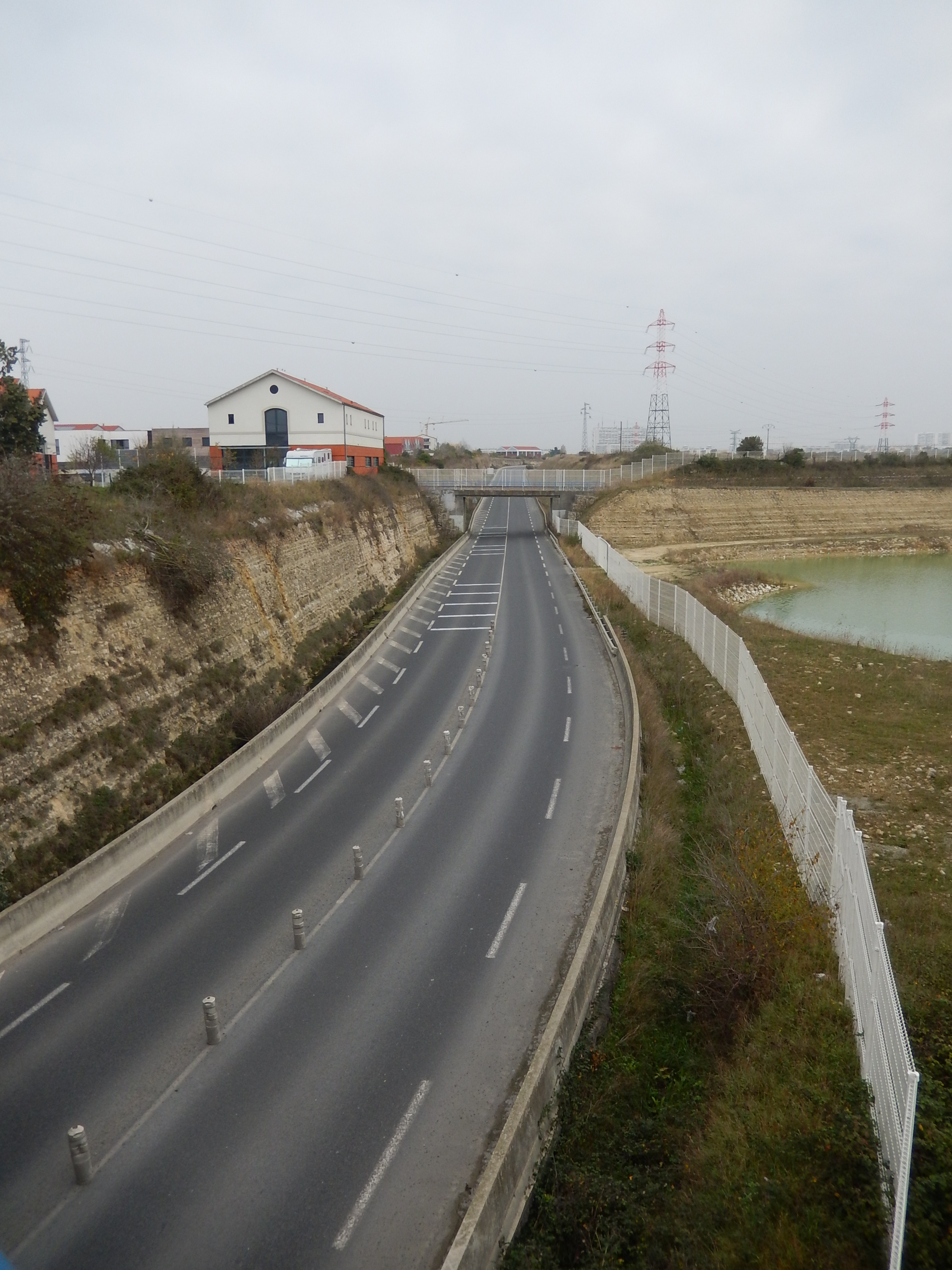 La route nationale française 537, intégralement située à La Rochelle, relie le quartier de La Pallice (ainsi que sa zone portuaire) à la route nationale 237. Sur cette photo, la partie sud-ouest de la N537, appelée la Voie de Jeumont.